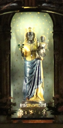 Die Schwarze Madonna von Oropa